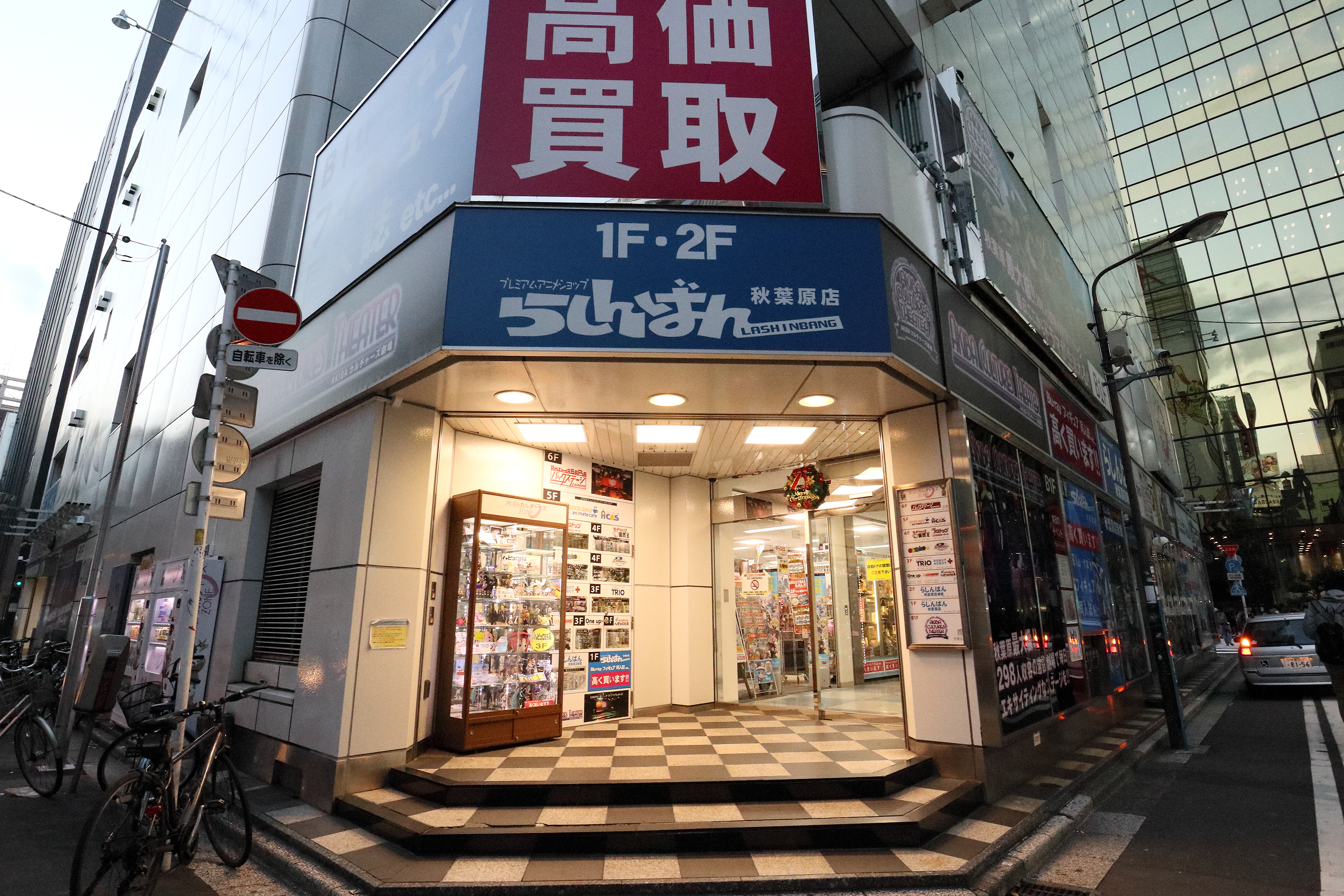 日本中古動漫畫周邊商品專賣店指南針（Lashinbang）秋葉原店。